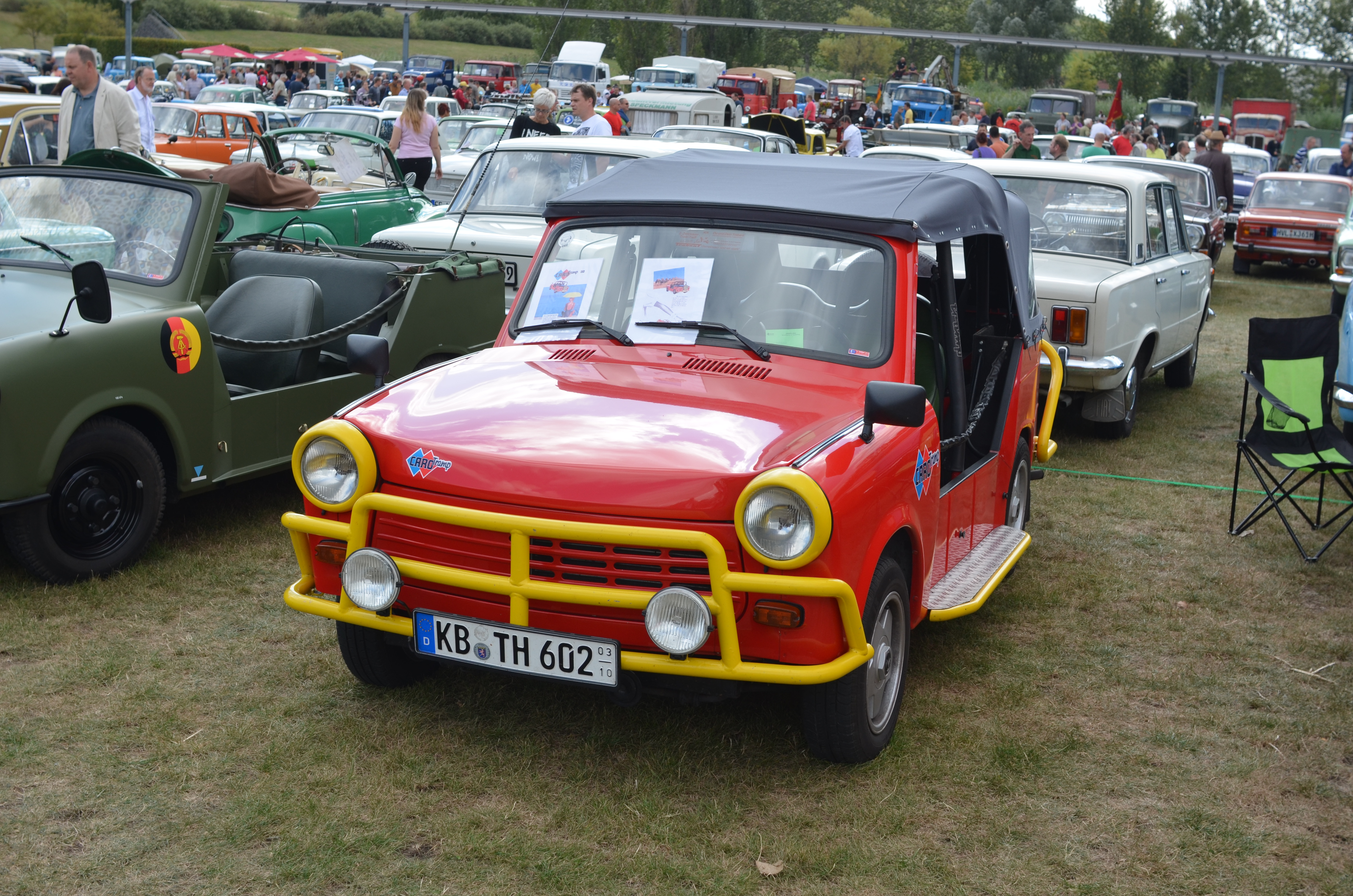 Trabant 1.1 Tramp